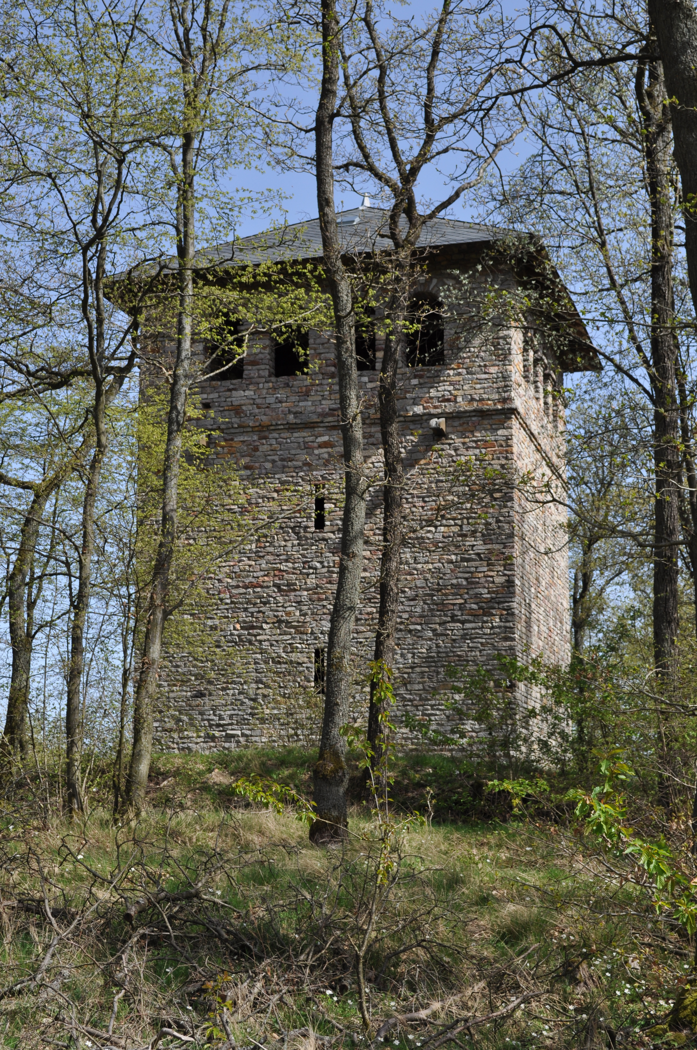 Römischer Wachturm WP 4/16 auf dem Gaulskopf